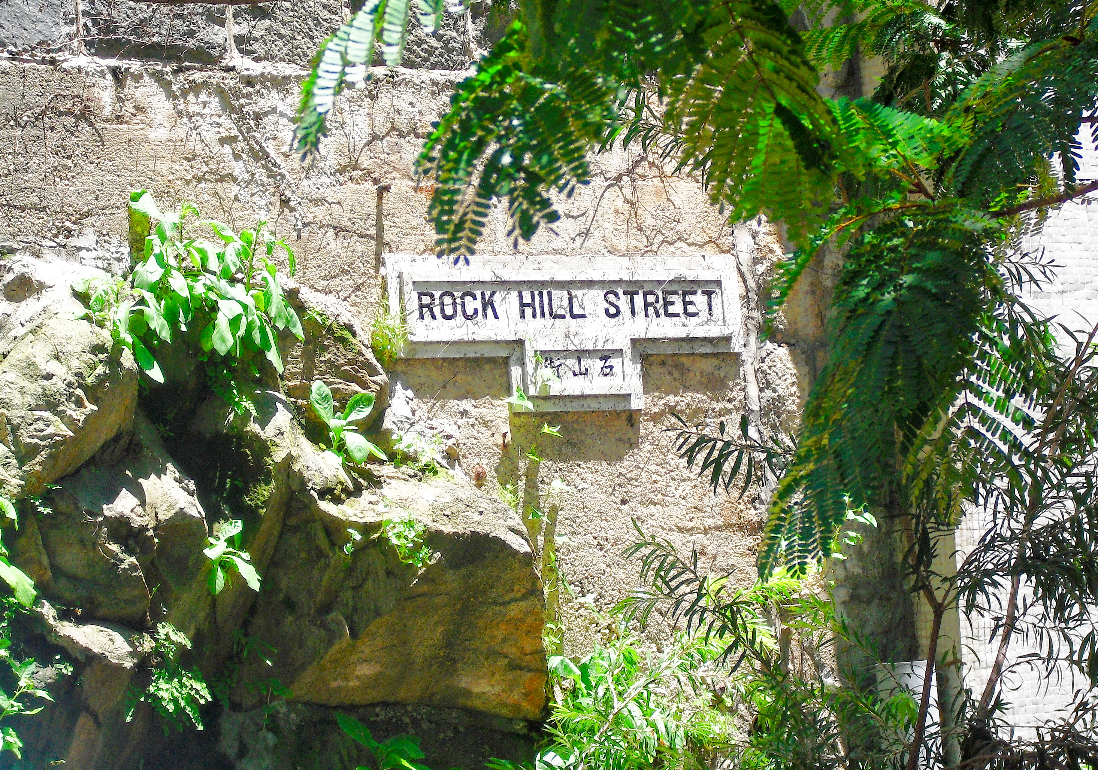 舊石山街路牌